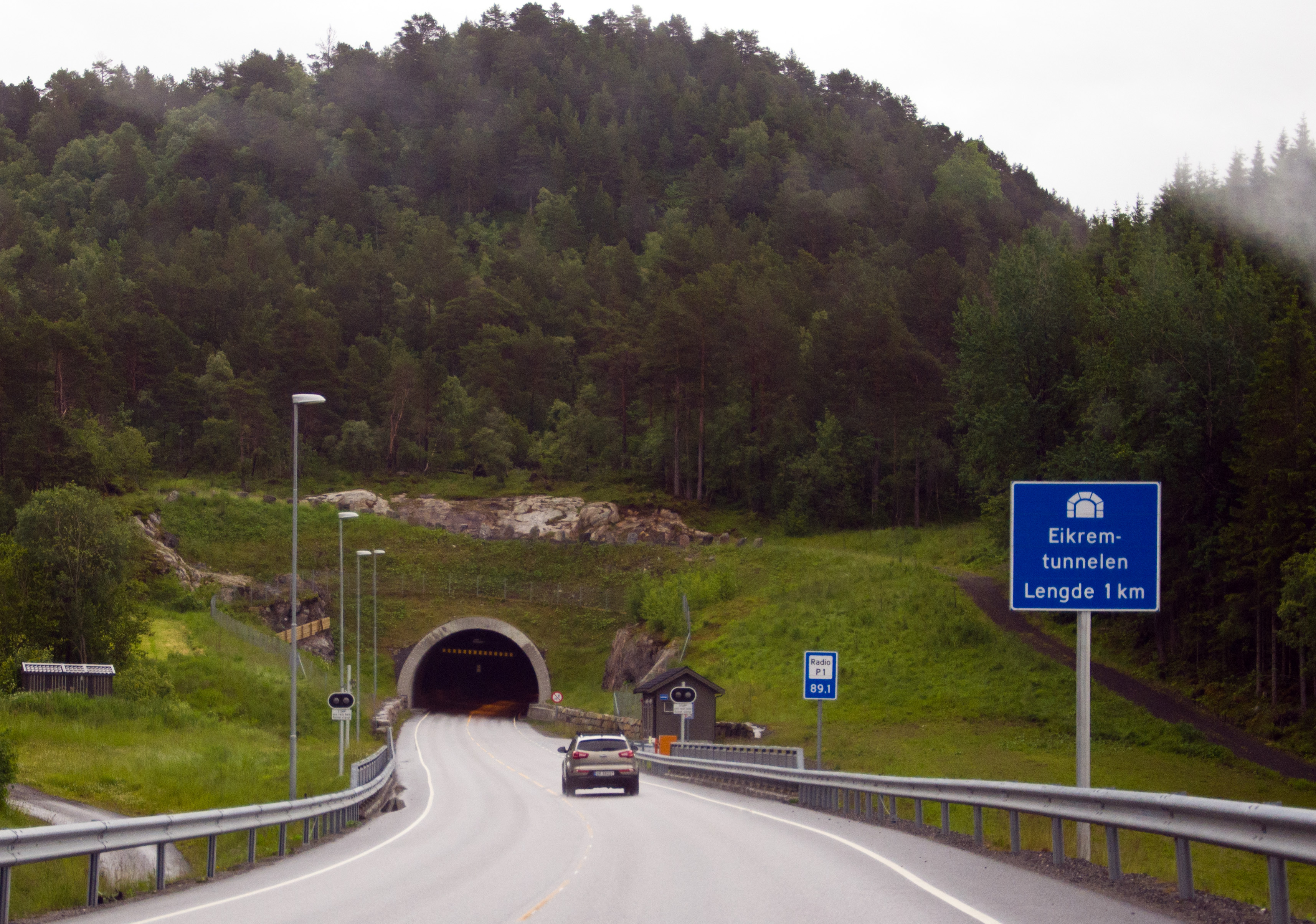 Eikremtunnelen på rv 70, Tingvoll, Møre og Romsdal